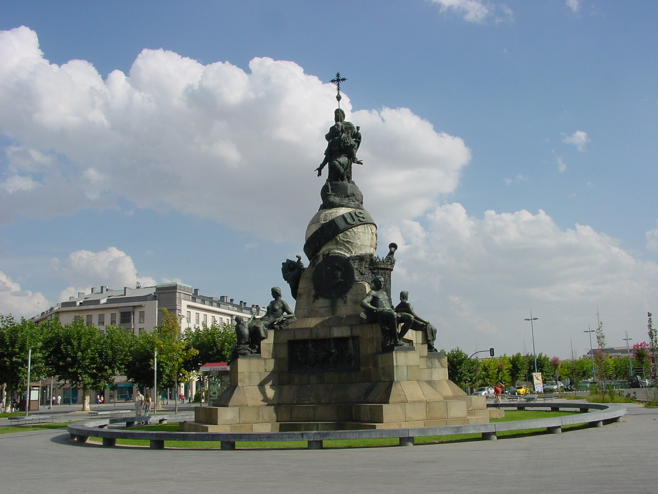 Valladolid (España). Monumento a Cristóbal Colón